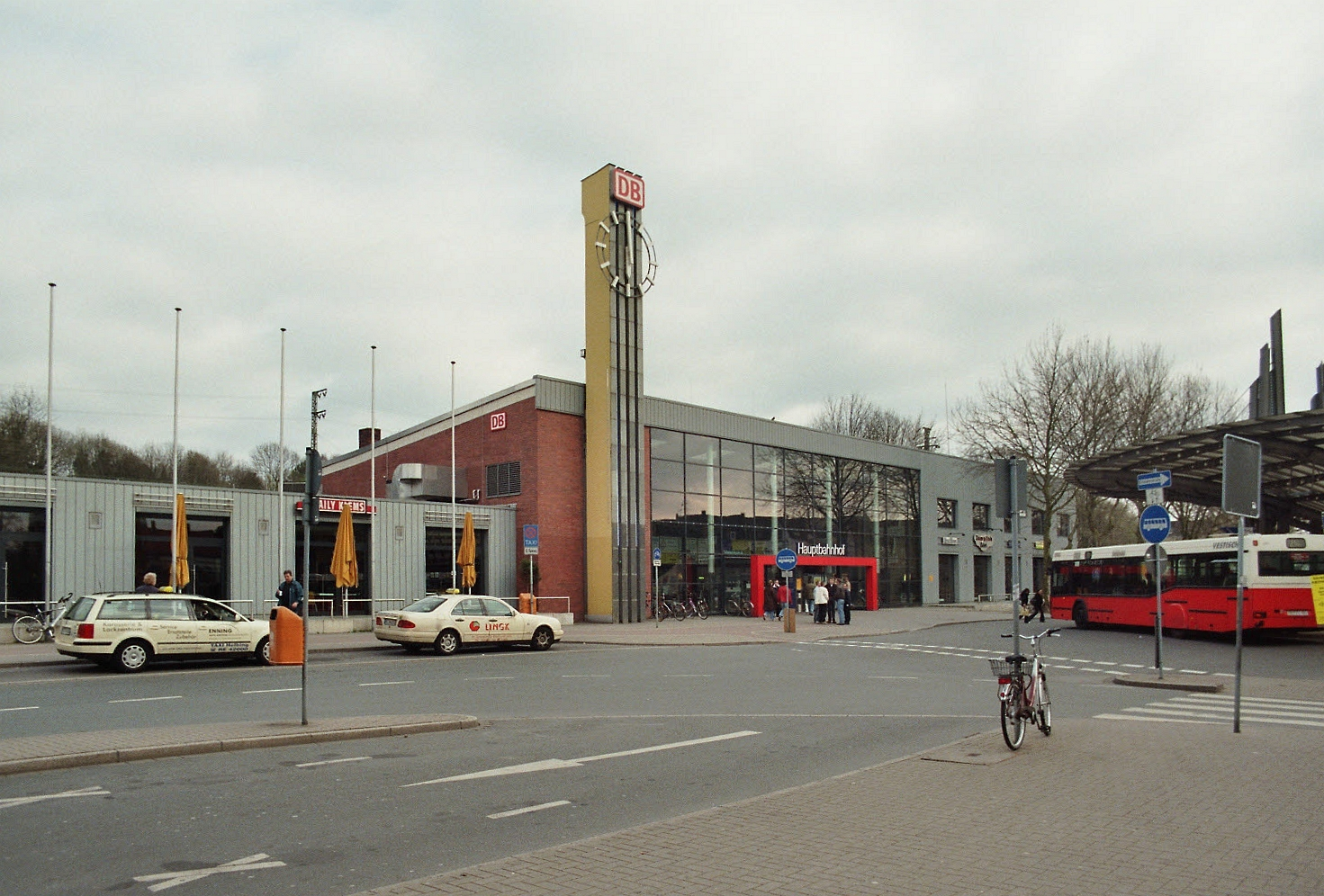 Das Empfangsgebäude des Recklinghäuser Hauptbahnhofes in Deutschland